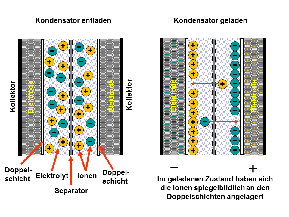 Prinzipdarstellung der Ladungsverteilung in einem Doppelschichtkondensator